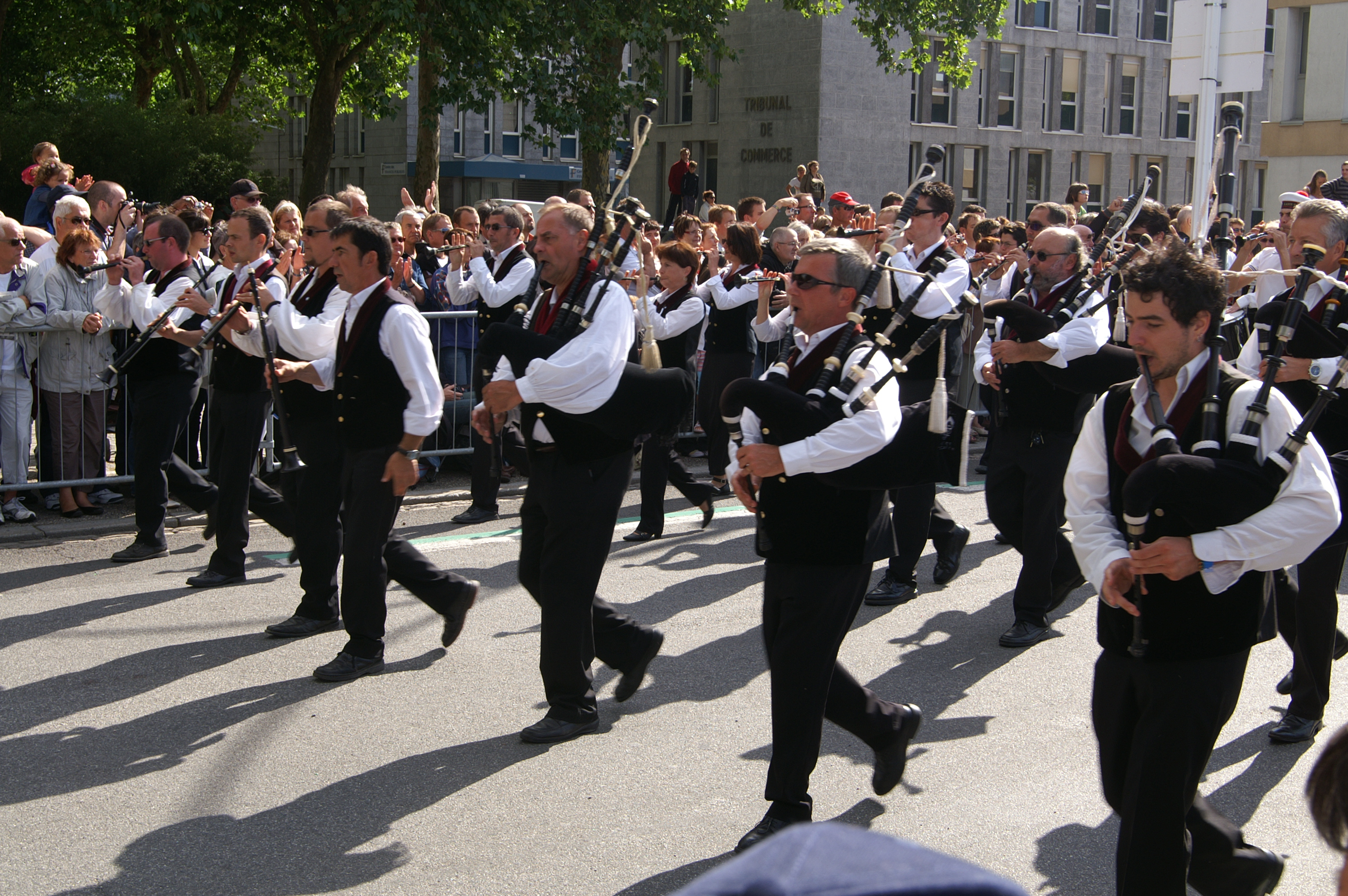 Le bagad de Saint-Nazaire, Festival interceltique de Lorient 2011.